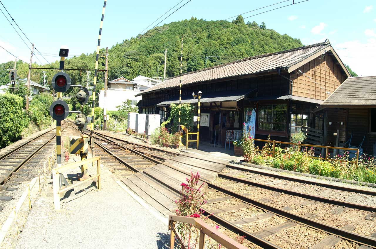 下泉駅